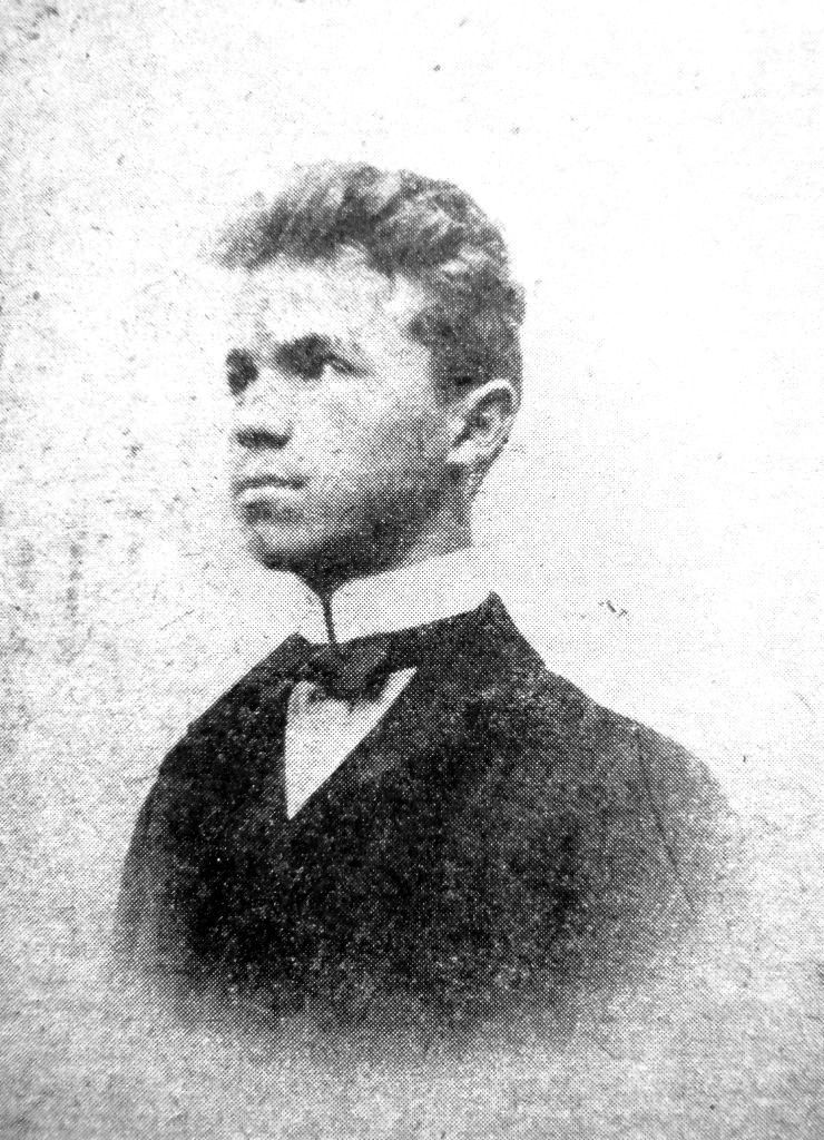 Vojtěch Martínek (1887-1960) v době gymnaziálních studií